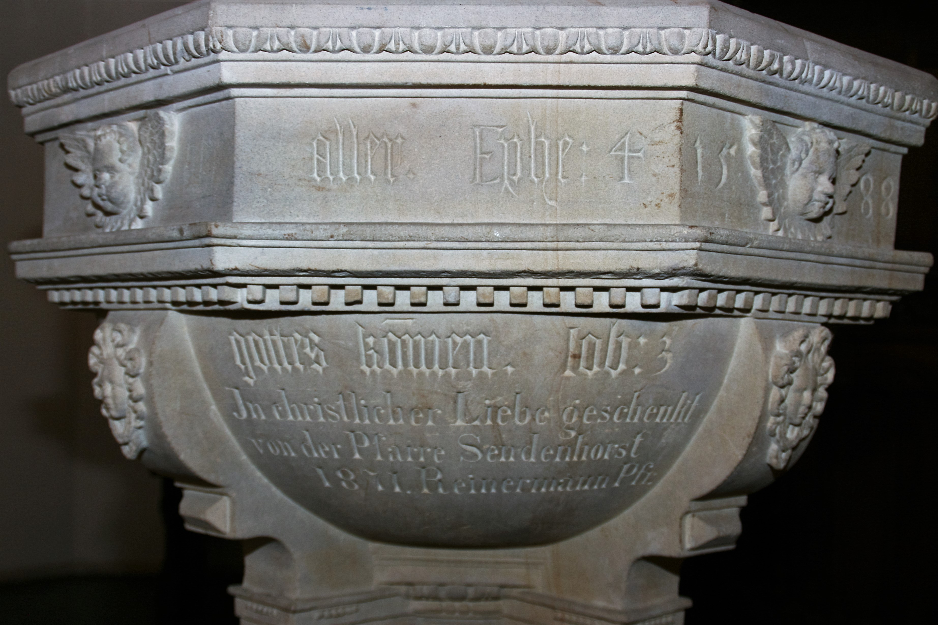 Inschrift des Sendenhorster Taufsteins 4, Standort: St. Laurentiuskirche, Westkirchen.